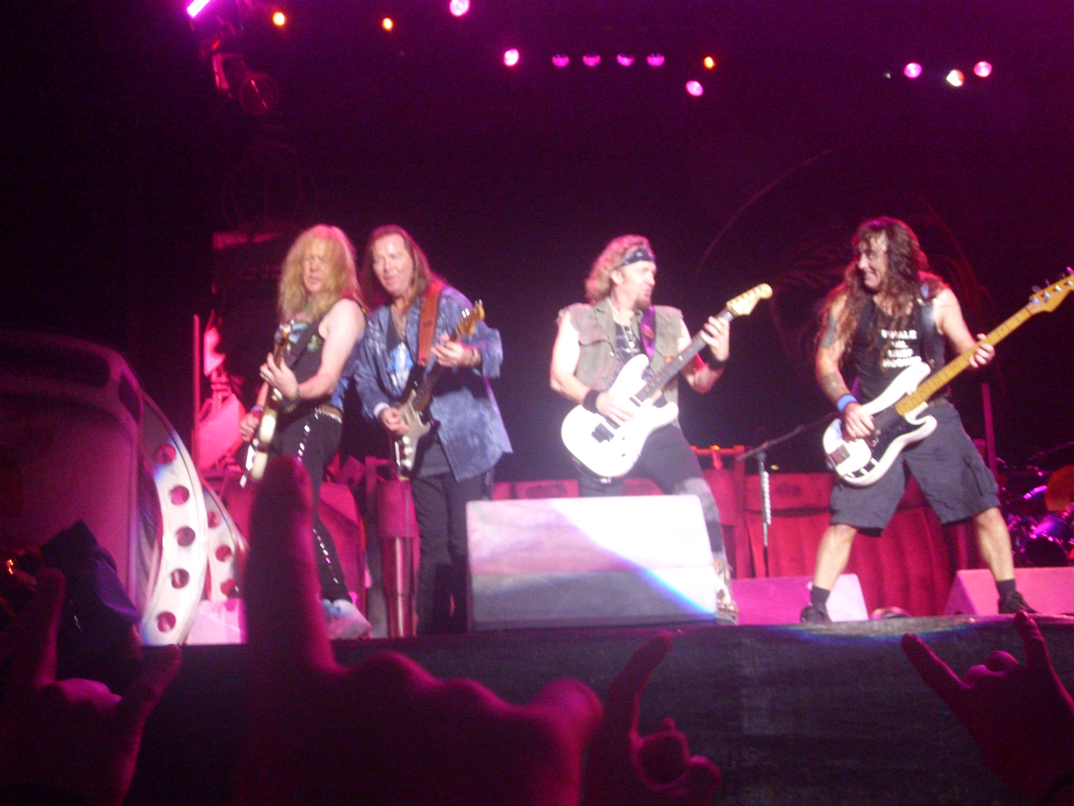 Iron Maiden on stage in Bergen